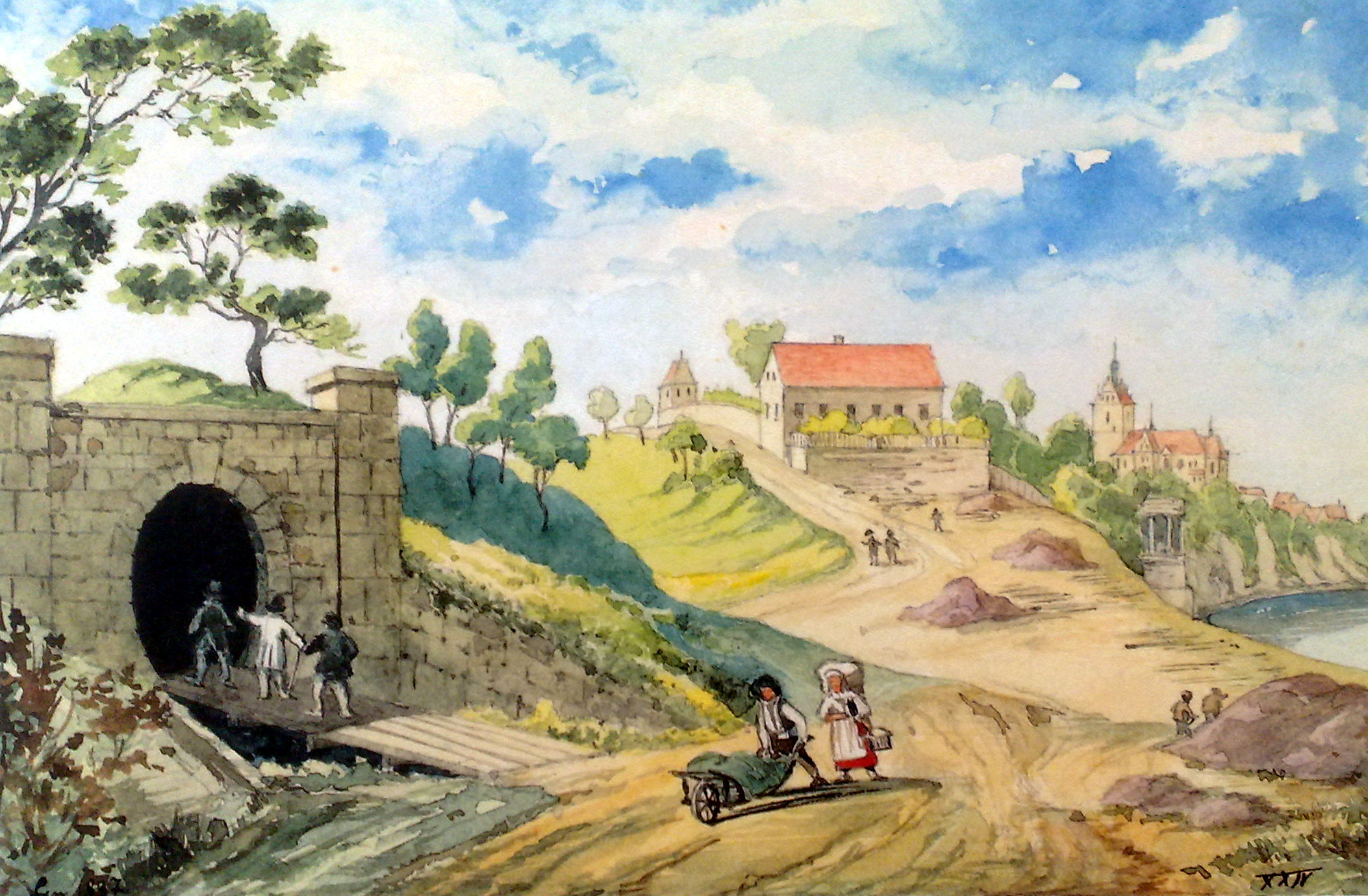 Das Mundloch des Elbstolln in Briesnitz, 1837, unbekannter Künstler; Original: Stadtmuseum Dresden; Bergbauaustellung in Freital Burgk 2013